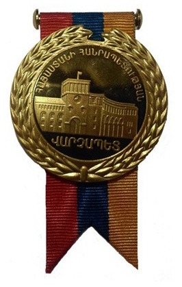 Հայաստանի Հանրապետության Վարչապետի «ՀՀ Վարչապետի հուշամեդալ»